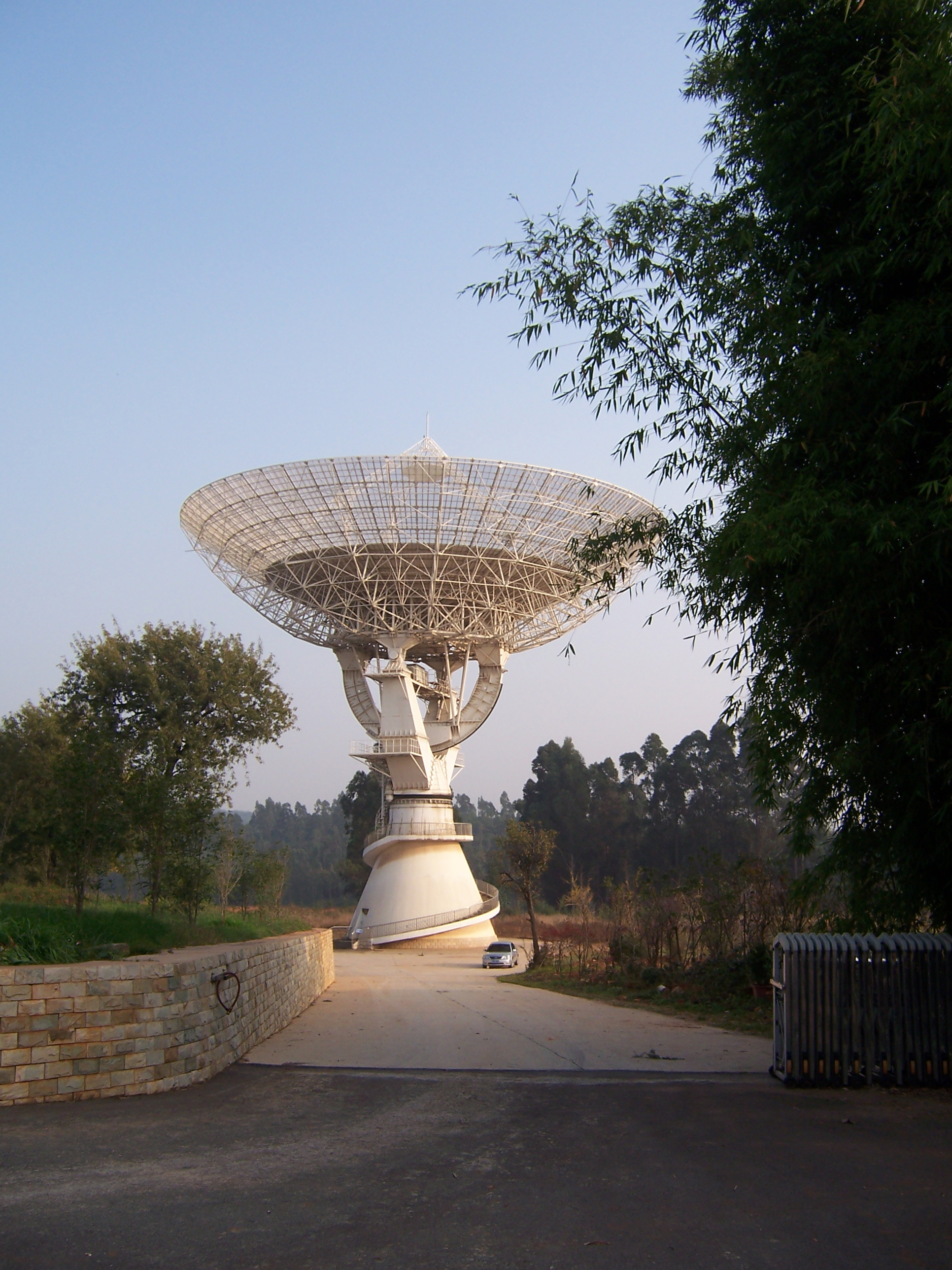 射电望远镜